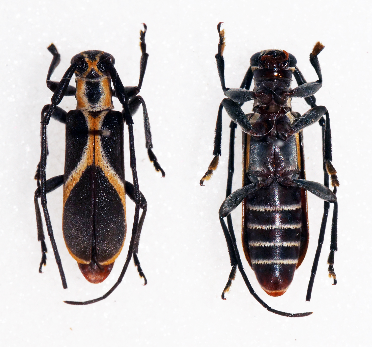 Gahan,1904 Sex: Female Data: 09-12-10 - Cuacua Lodge 36m - 8km East Caia - Zambezi River - Mozambique Size: 10mm